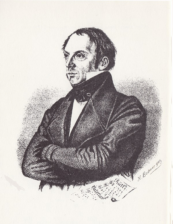 Franz Josef Greith (1799-1869), Schweizer Musikpädagoge und Komponist, Tätigkeit in St. Gallen von 1833-1860